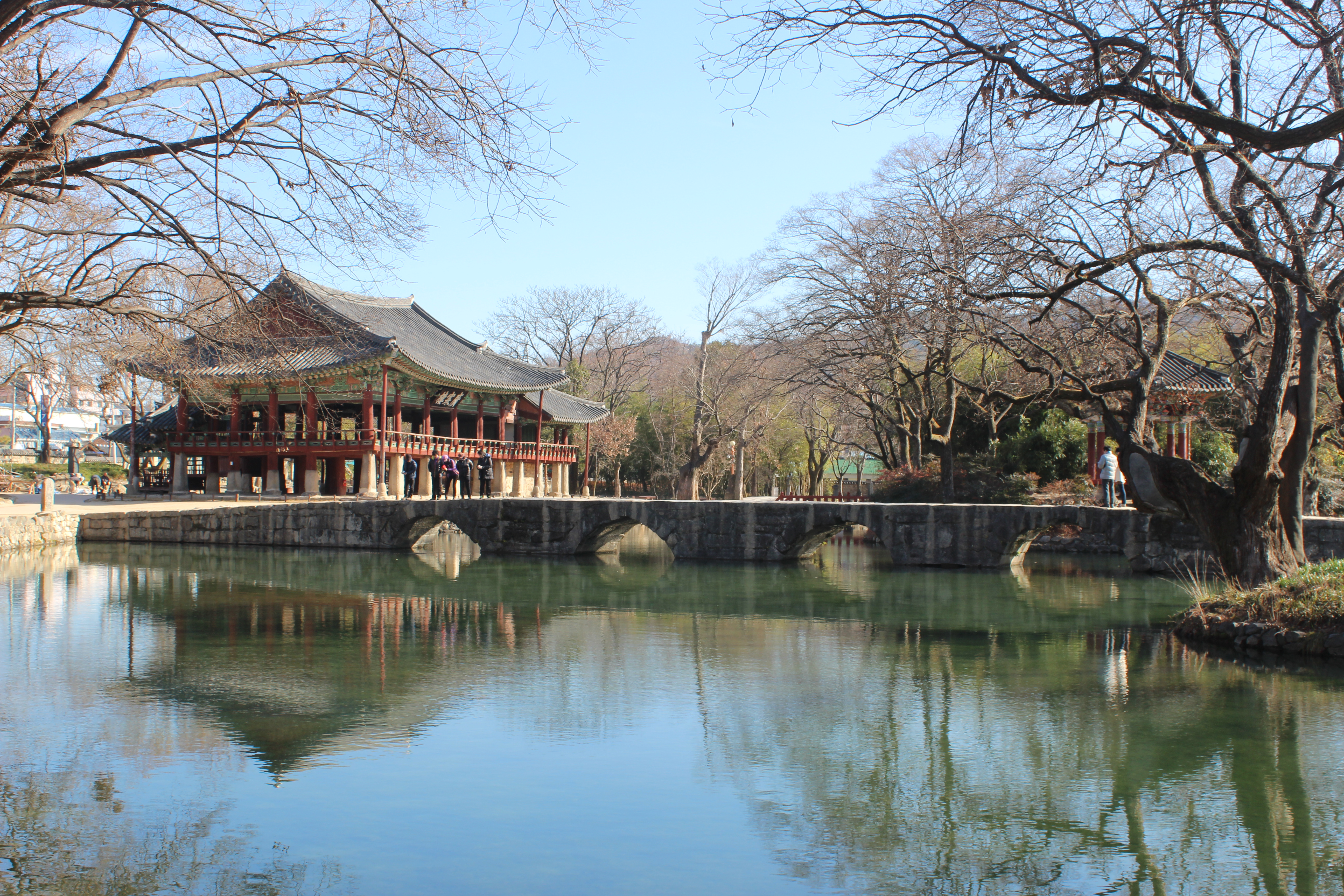 추운 겨울의 광한루